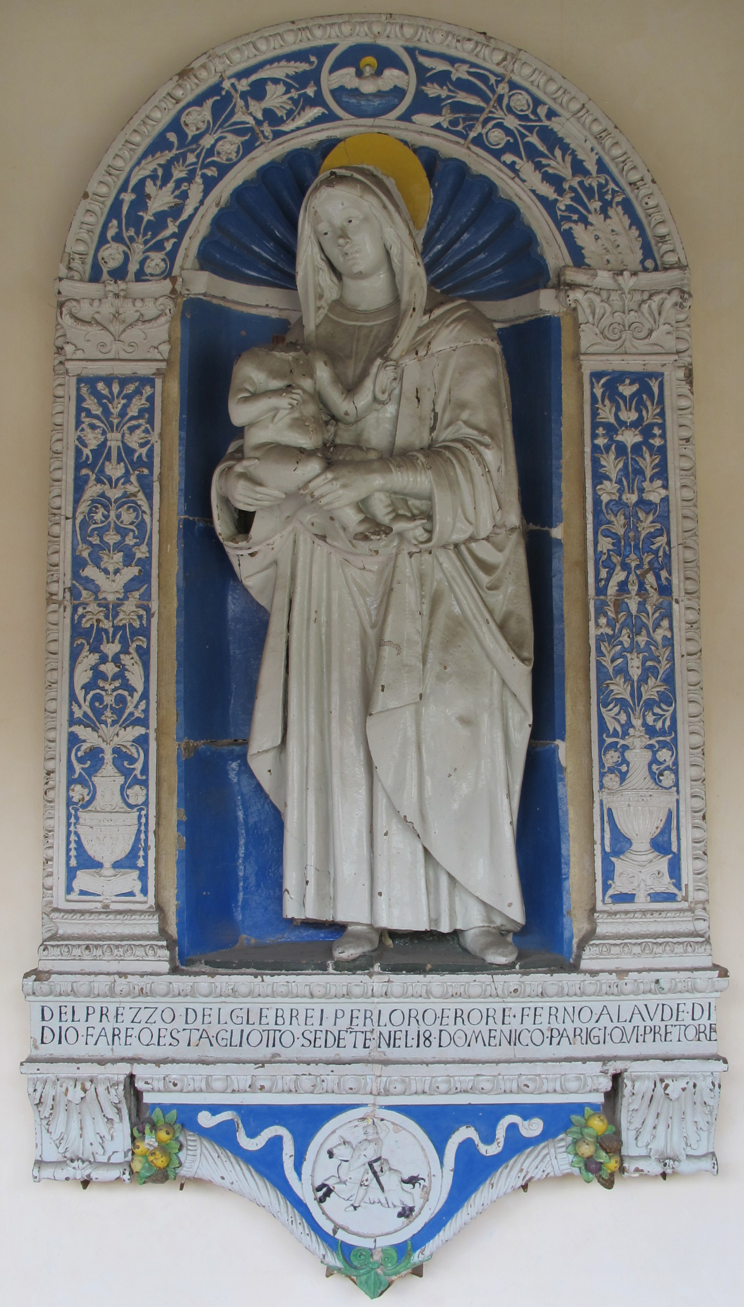 Andrea della robbia (bottega), tabernacolo con madonna col bambino, 1518, da palazzo pretorio di empoli